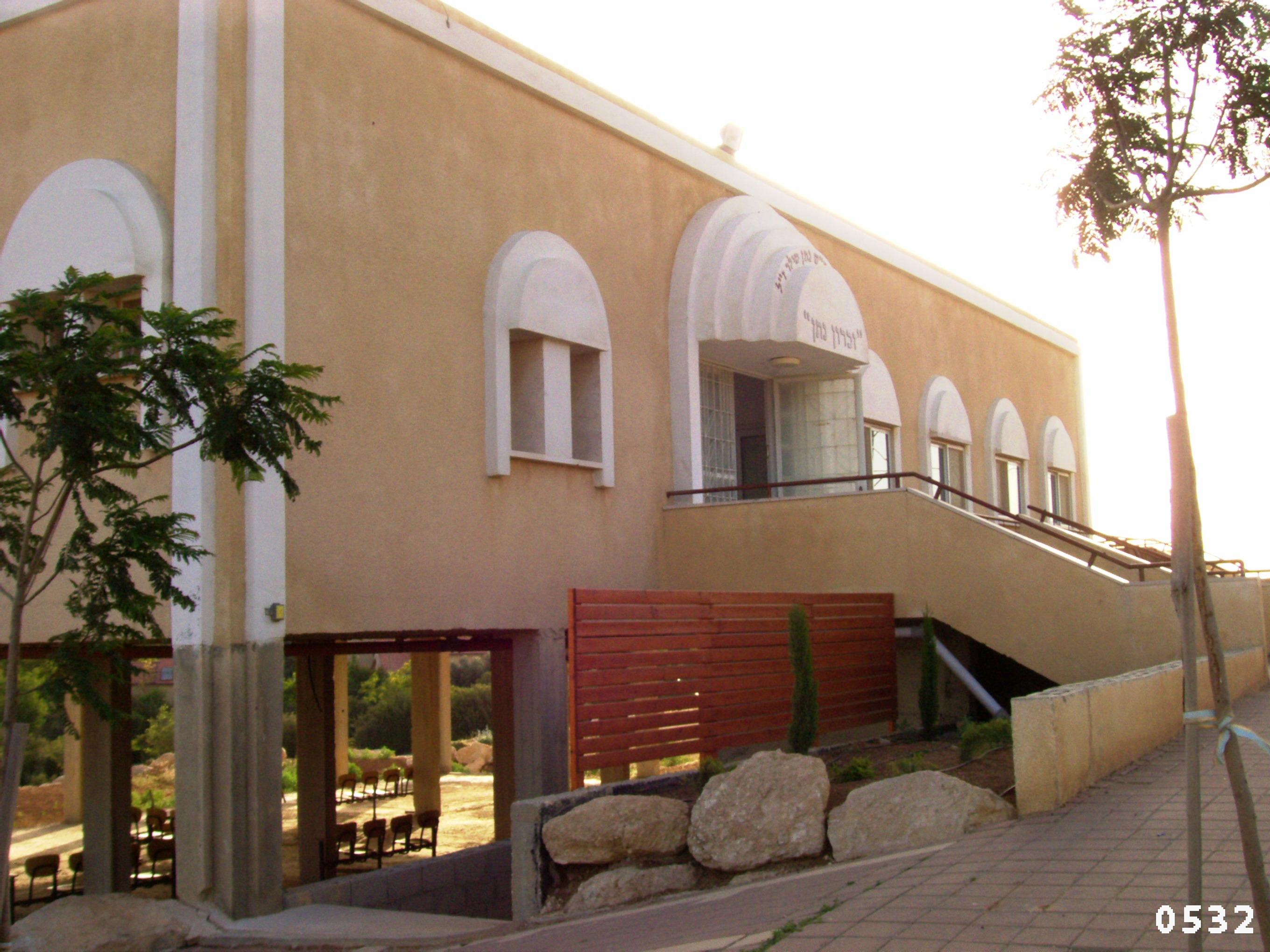 maon synagoue